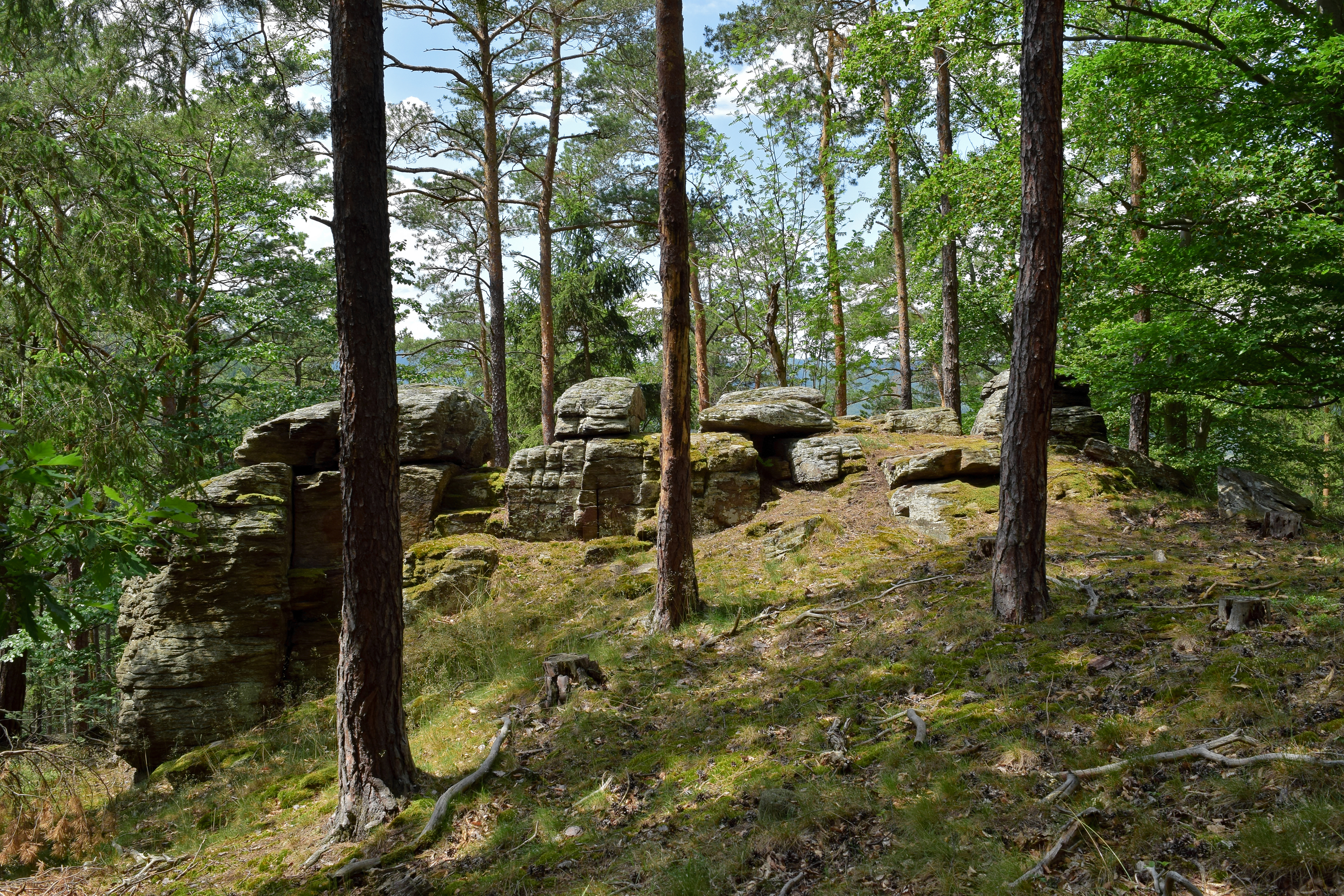 Dunkelsteinerwald, Gemeinde Rossatz-Arnsdorf